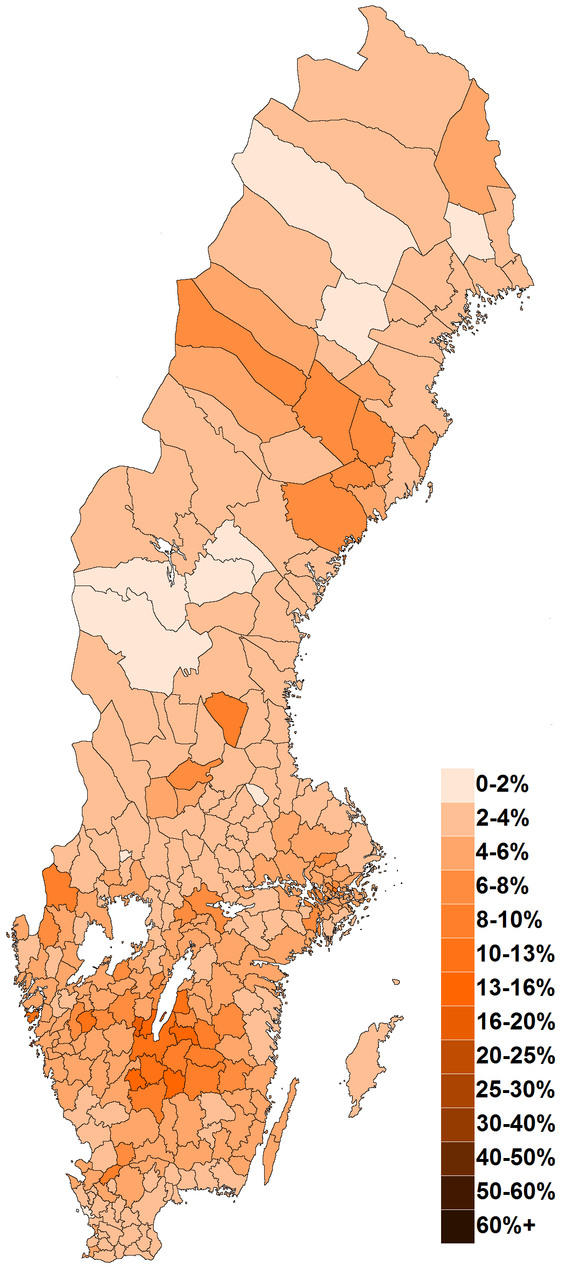 Stöd för Kristdemokraterna efter kommun i riksdagsvalet 2014